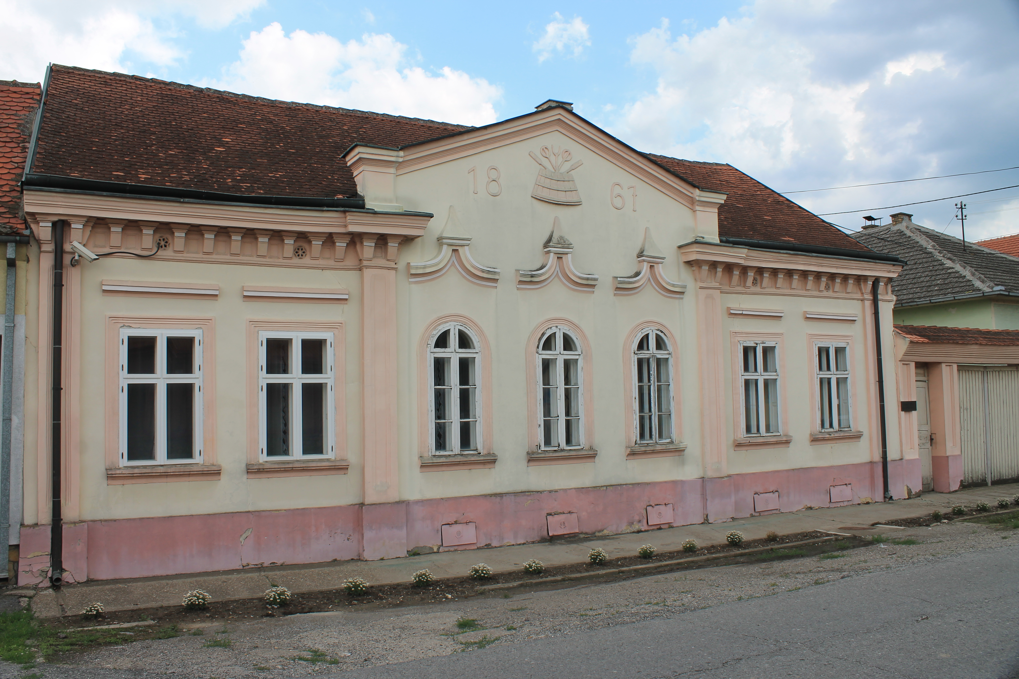 Kuća Save Šumanovića